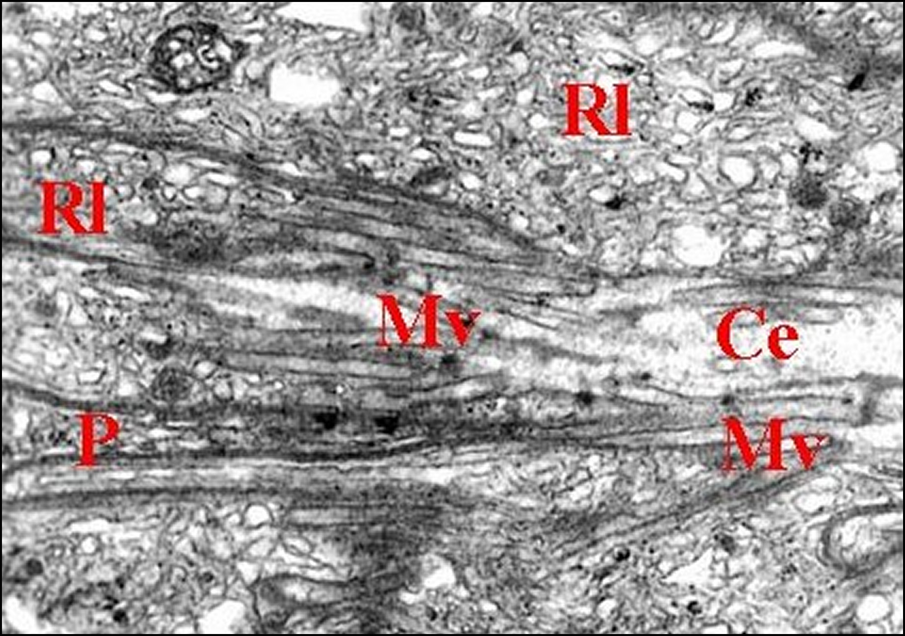 Autres languettes et microvilli apicales des cellules glandulaires dans la chambre d'une glande rostrale d' Argyrodes en coupe longitudinale, vues au microscope électronique à transmission.